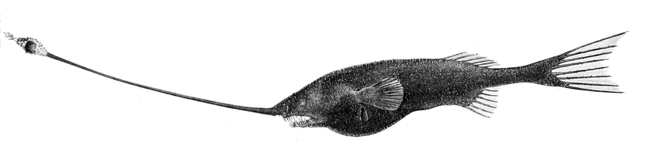 Gigantactis vanhoeffeni at 1500 m